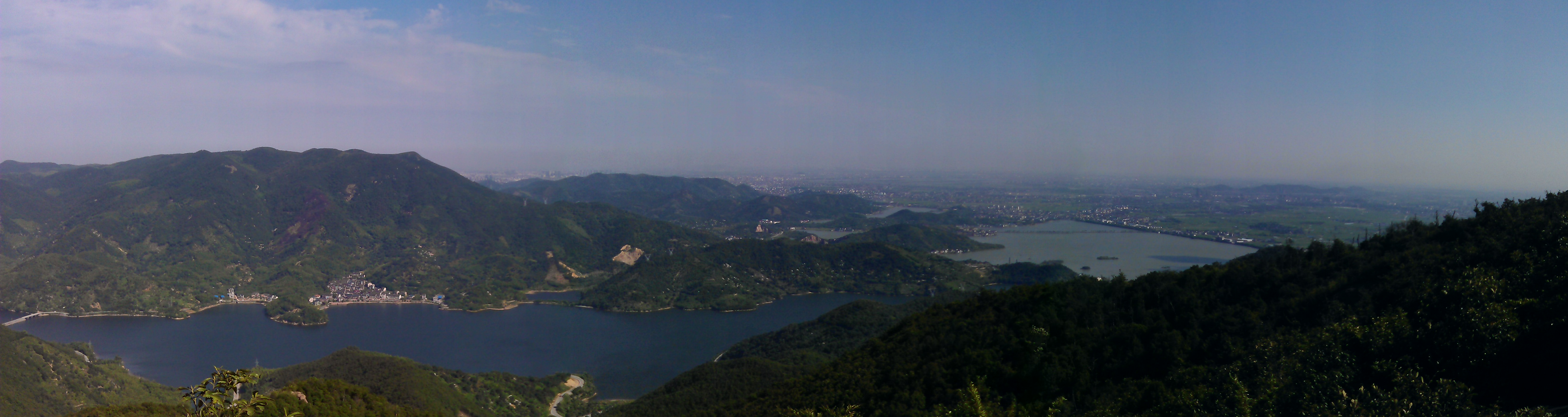 在五磊山拍摄